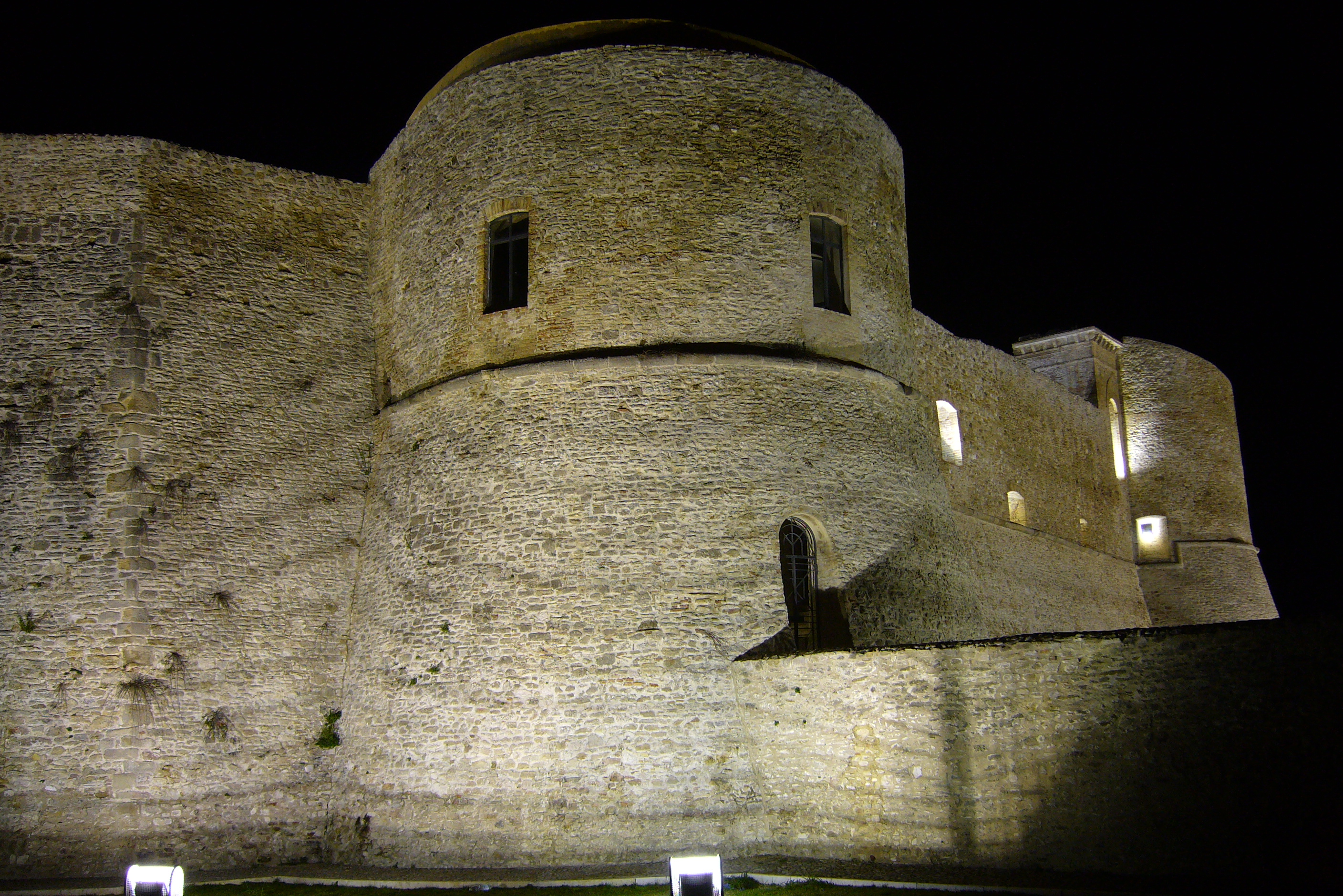 Ortona Castello Aragonese di Notte